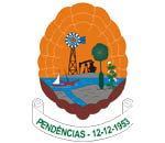 Brasão de Pendências, estado do Rio Grande do Norte, Brasil.